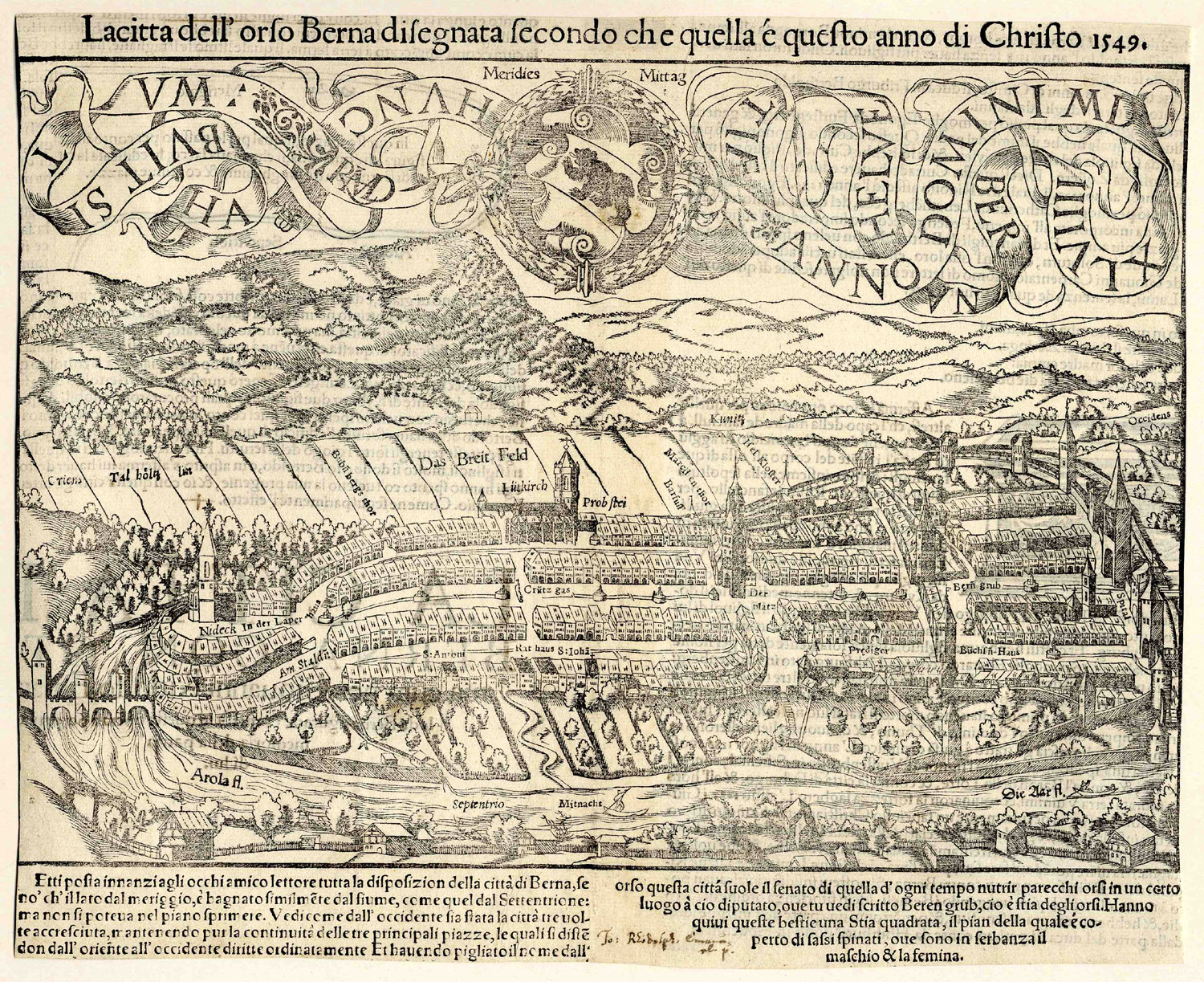 Deutsch, Hans Rudolf Manuel: Ansicht der Stadt Bern; Holzschnitt, 1549